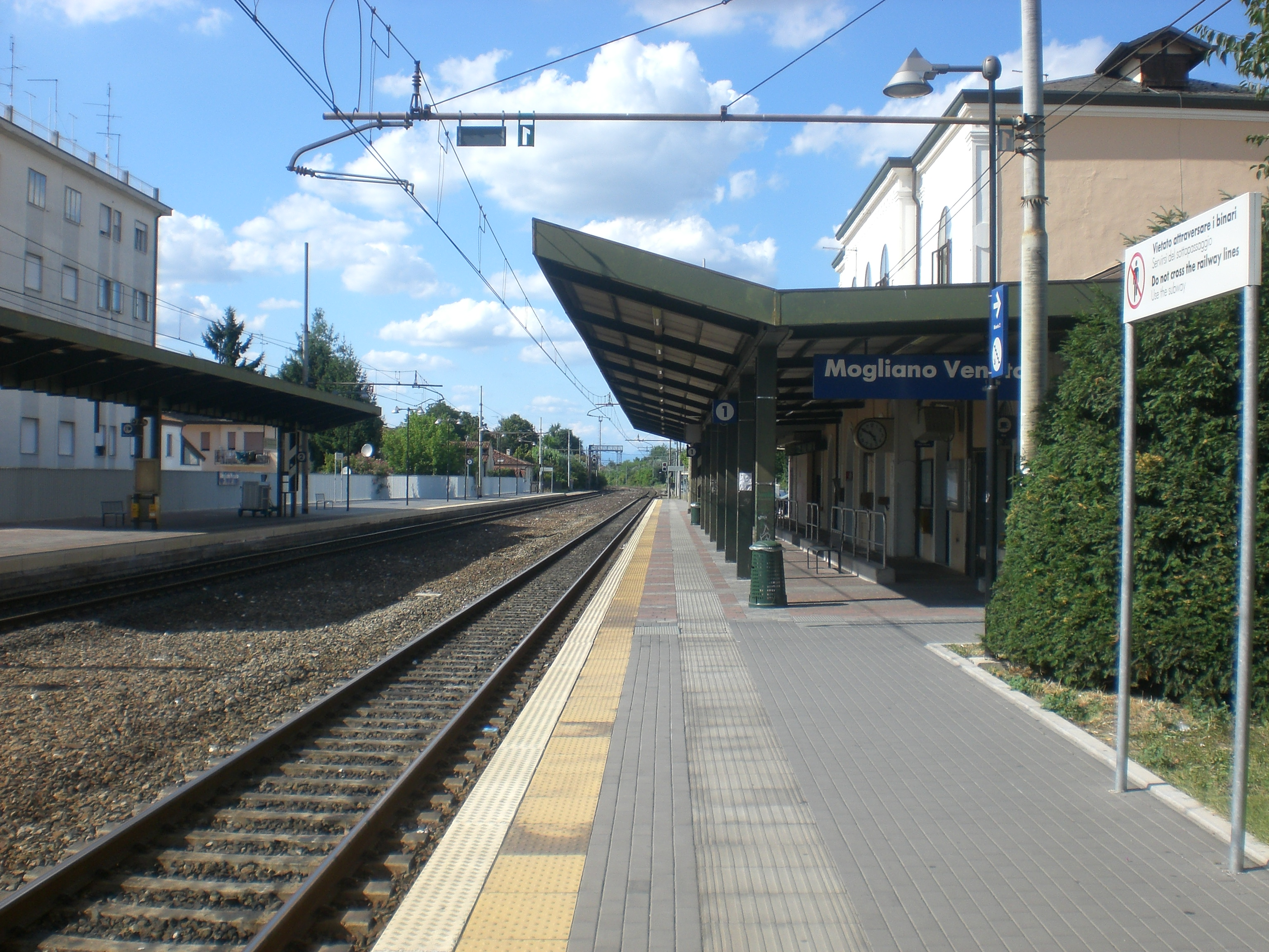 Mogliano V.